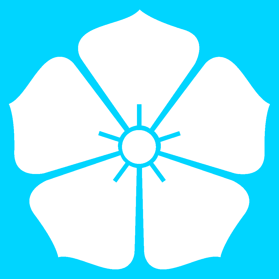 水色桔梗紋